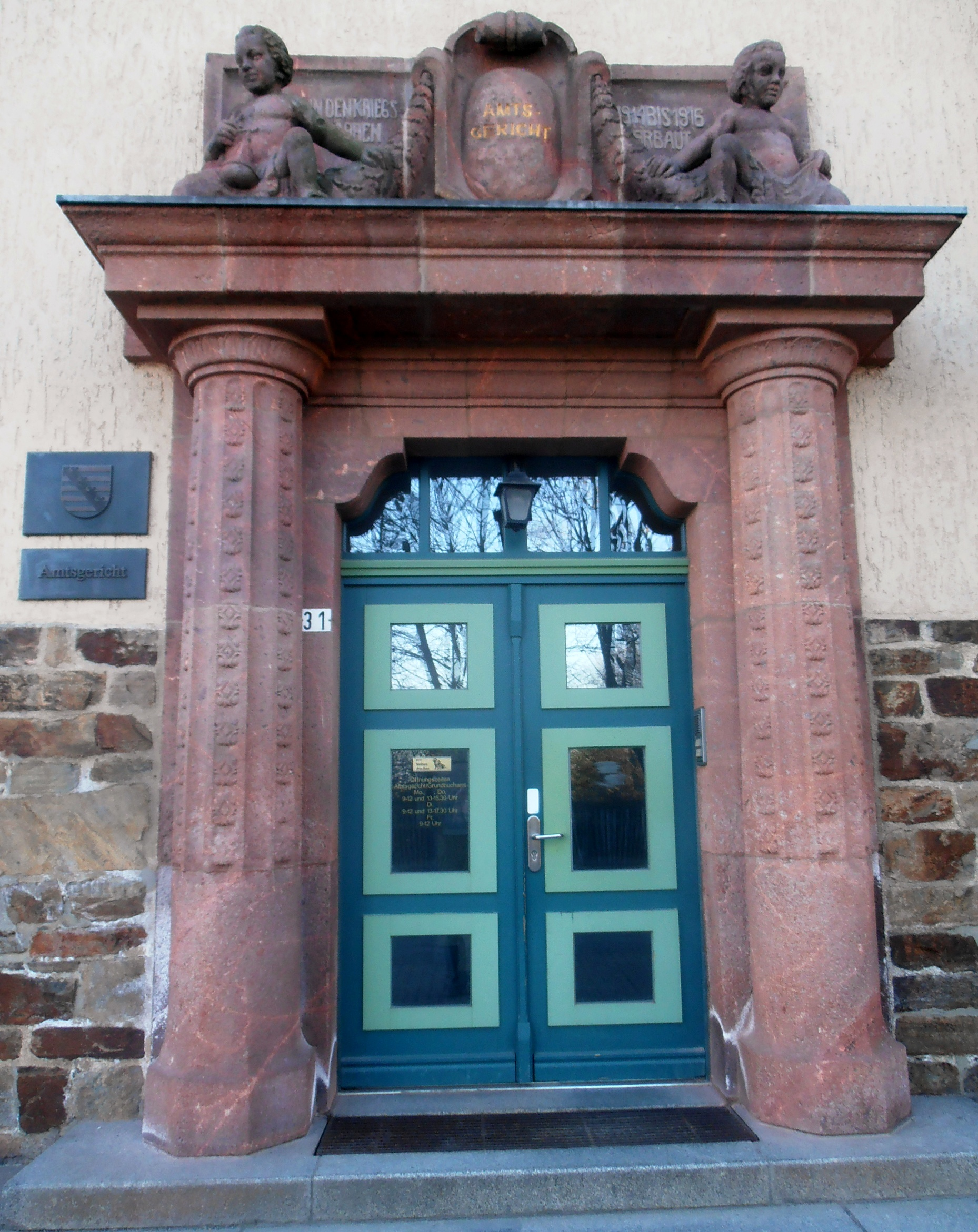 Das Amtsgericht in Marienberg im Erzgebirge, Eingangsportal